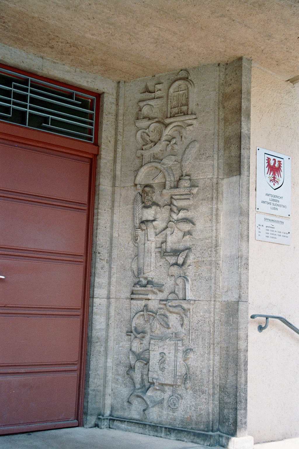 Relief am Haupteingang des Amtsgerichts Lübben in Lübben, Landkreis Dahme-Spreewald, Brandenburg, Deutschland. Das Gebäude steht unter Denkmalschutz.